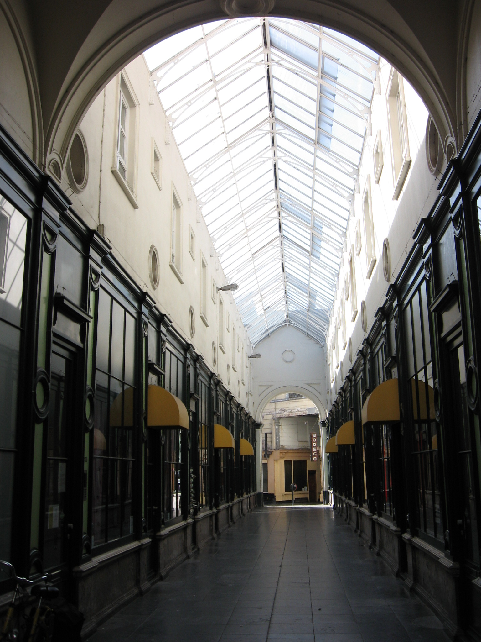 Pieter Vanderdockstraat ('glazen straat') , Gent; voormalige overdekte winkelgalerij, later bordelengalerij.